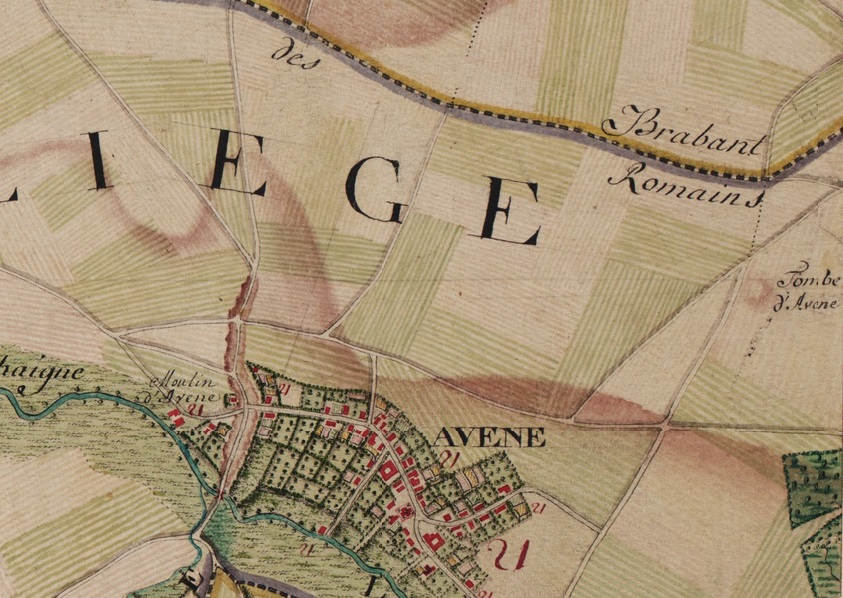 Extrait de la carte de Ferraris n° 134B